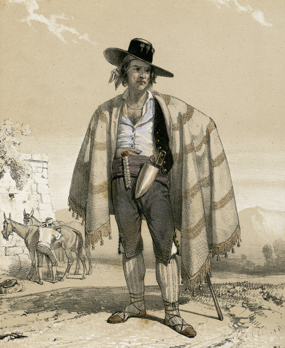 Gitano. Tondeur de Mulets (Pyrénées espagnoles). Extrait de l'album "Journal d'un voyage de Paris aux Eaux-Bonnes (Basses-Pyrénées) en allant par Orléans, Tours, Poitiers, Bordeaux et Pau